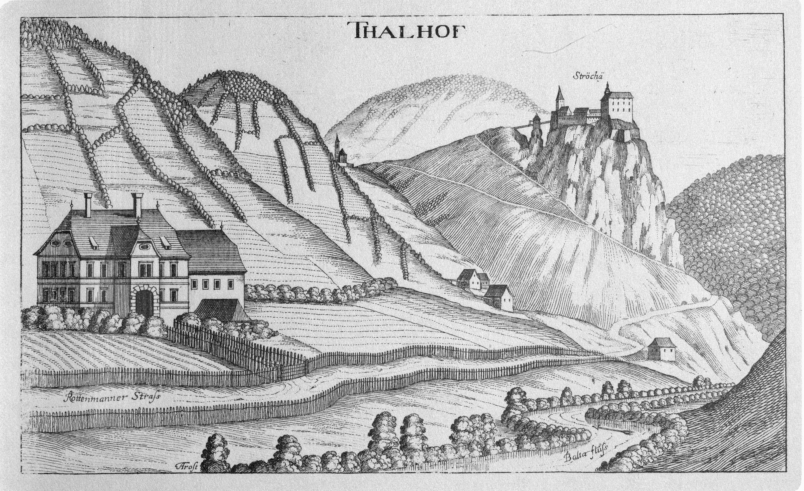 G. M. Vischers Käyserlichen Geographi, Topographia Ducatus Stiriae, Das ist: Eigentliche Delineation / und Abbildung aller Städte / Schlösser / Marcktfleck / Lustgärten / Probsteyen / Stiffter / Clöster und Kirchen / so es sich im Herzogthumb Steyrmarck befinden; Und anjetzo Umb einen billichen Preyß zu finden seynd Bey Johann Bitsch Universitäts Buchhandlern / Auff dem Juden=Platz bey der guldenen Saulen. Graz 1681 Die Nummerierung der Dateien folgt der alphabetischen Reihung der Ortsnamen und entspricht nicht dem Vischer-Register